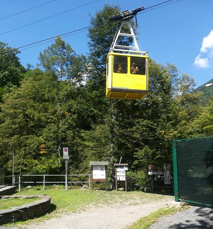 La funivia Ponte di Piero-Monteviasco in arrivo alla stazione di valle.